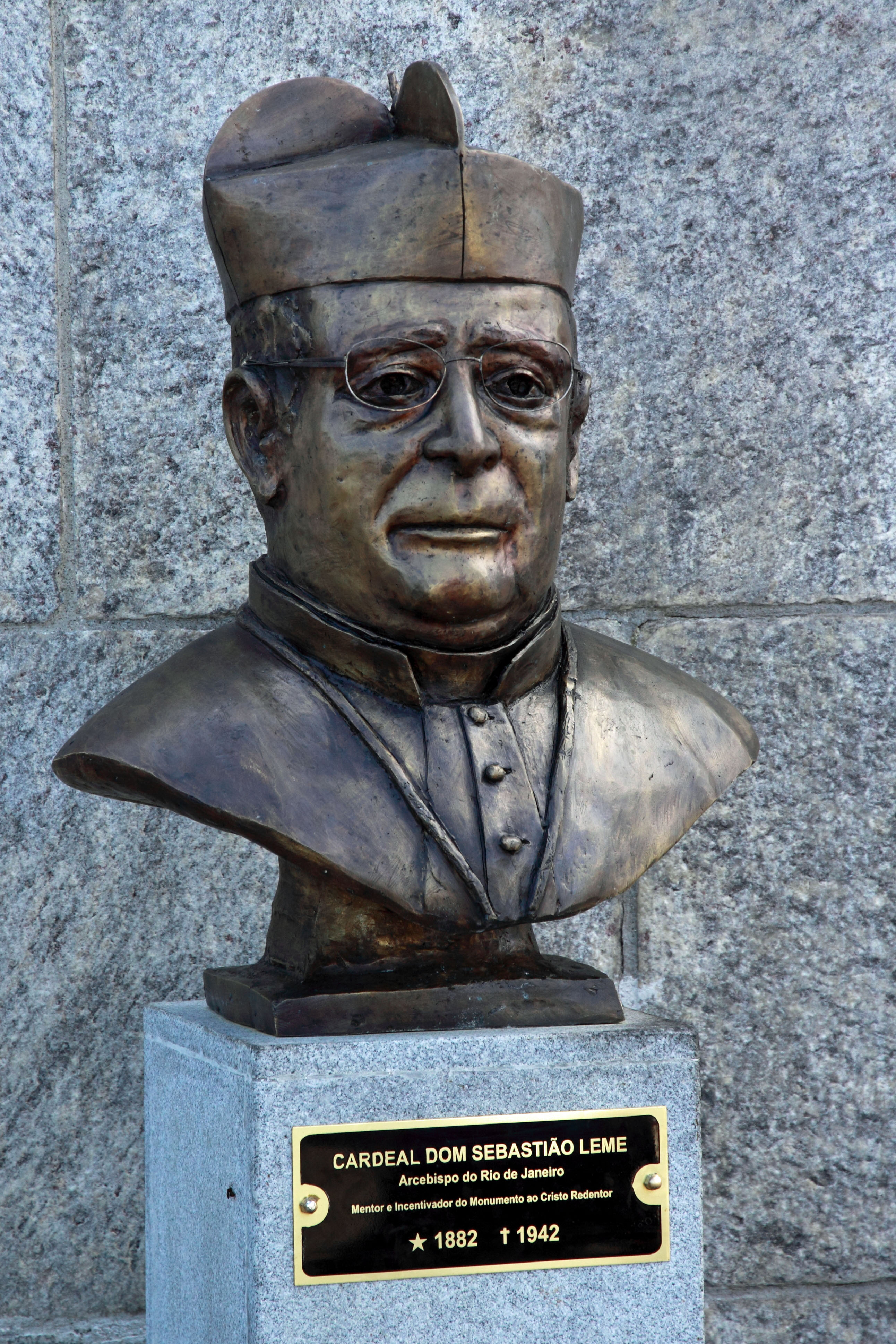 Busto do Cardeal Dom Sebastião Leme, Arcebispo do Rio de Janeiro, no Monumento ao Cristo Redentor.